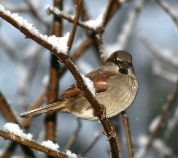 Gråsporv hann.